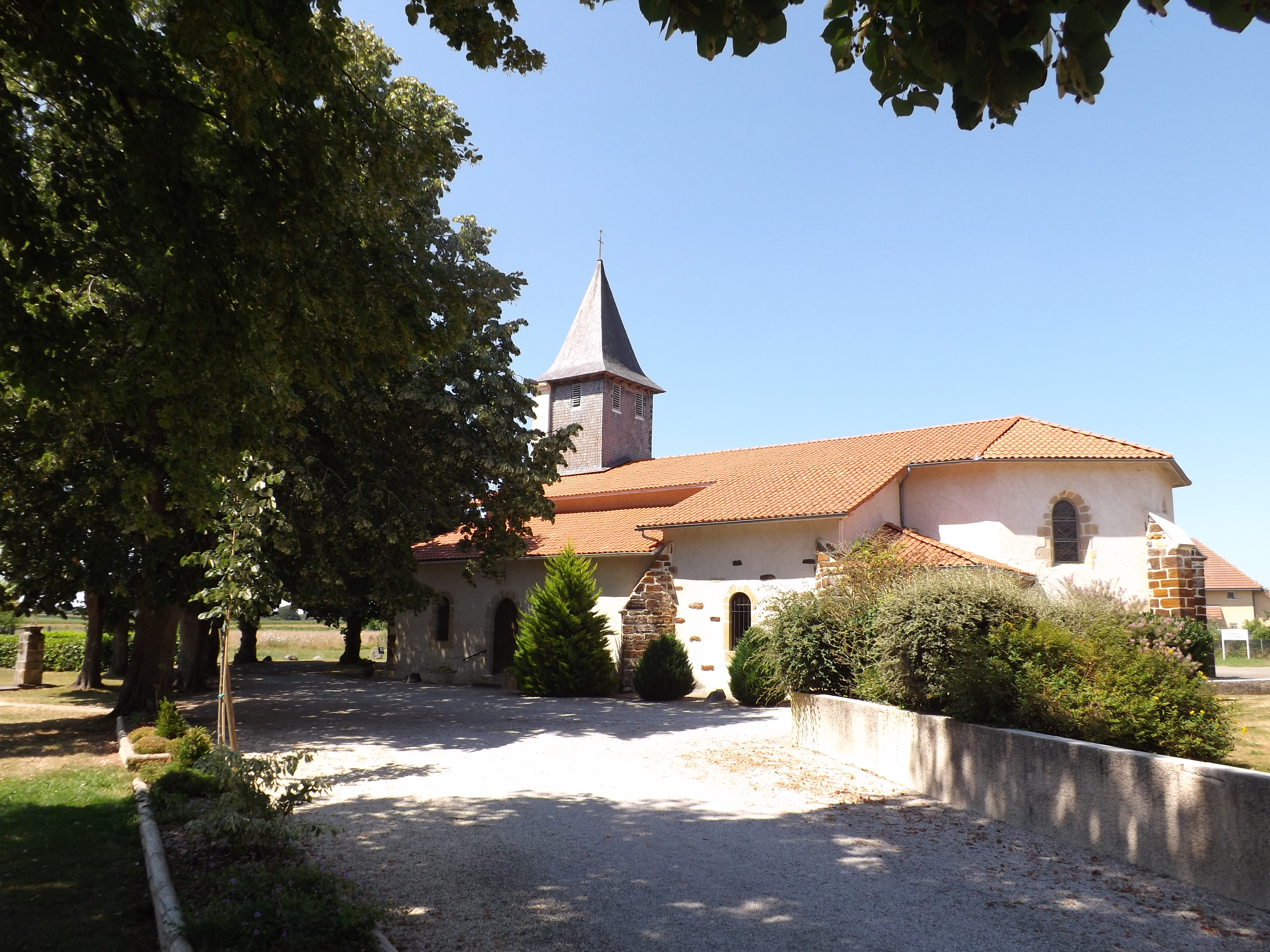 Glèisa de sent Andrèu de Malaussana, Bearn, Gasconha